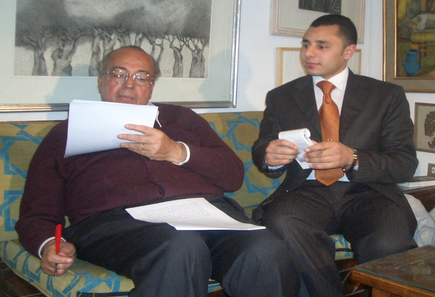 أبو النور